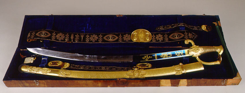 Sable de Honor del brigadier de la Armada Española, Cosme Damián de Churruca y Elorza